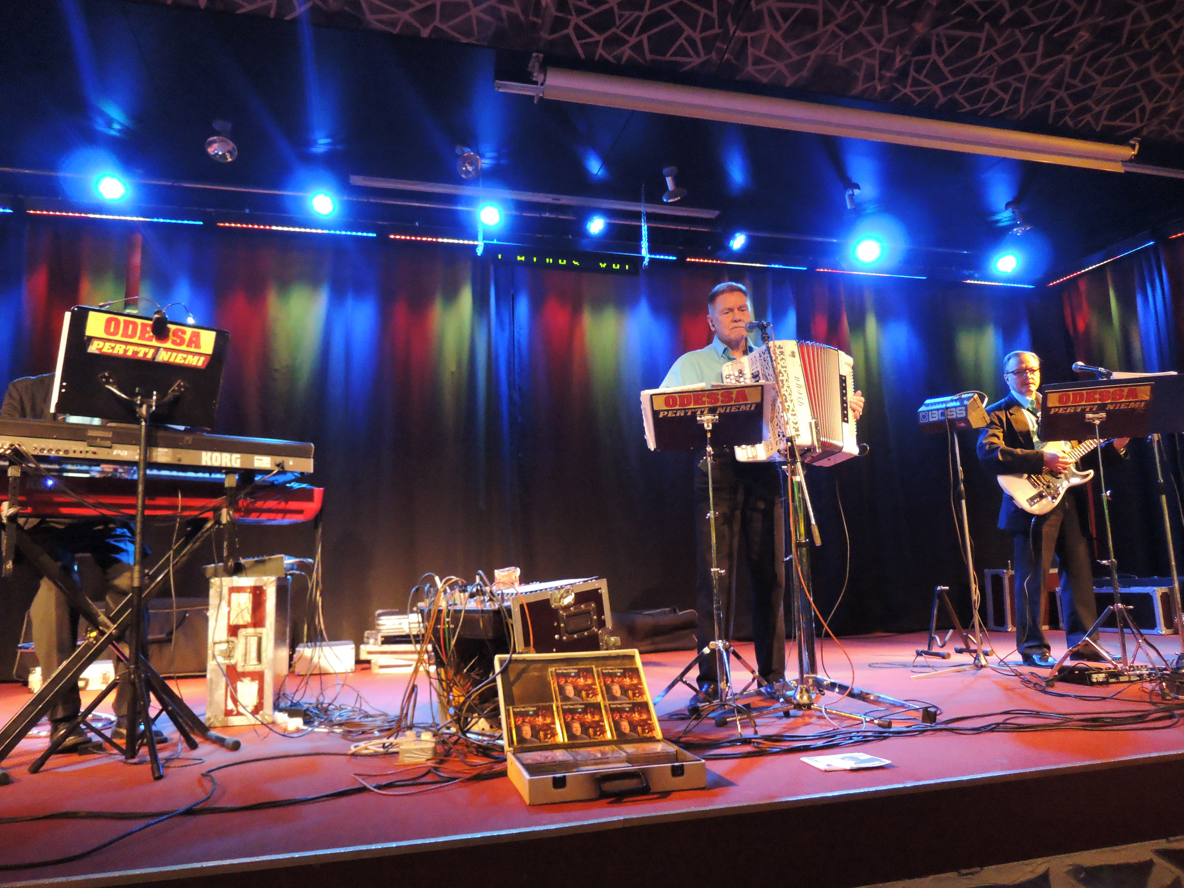 Pertti Niemi & Odessa SUOMALAINEN TANSSIORKESTERI